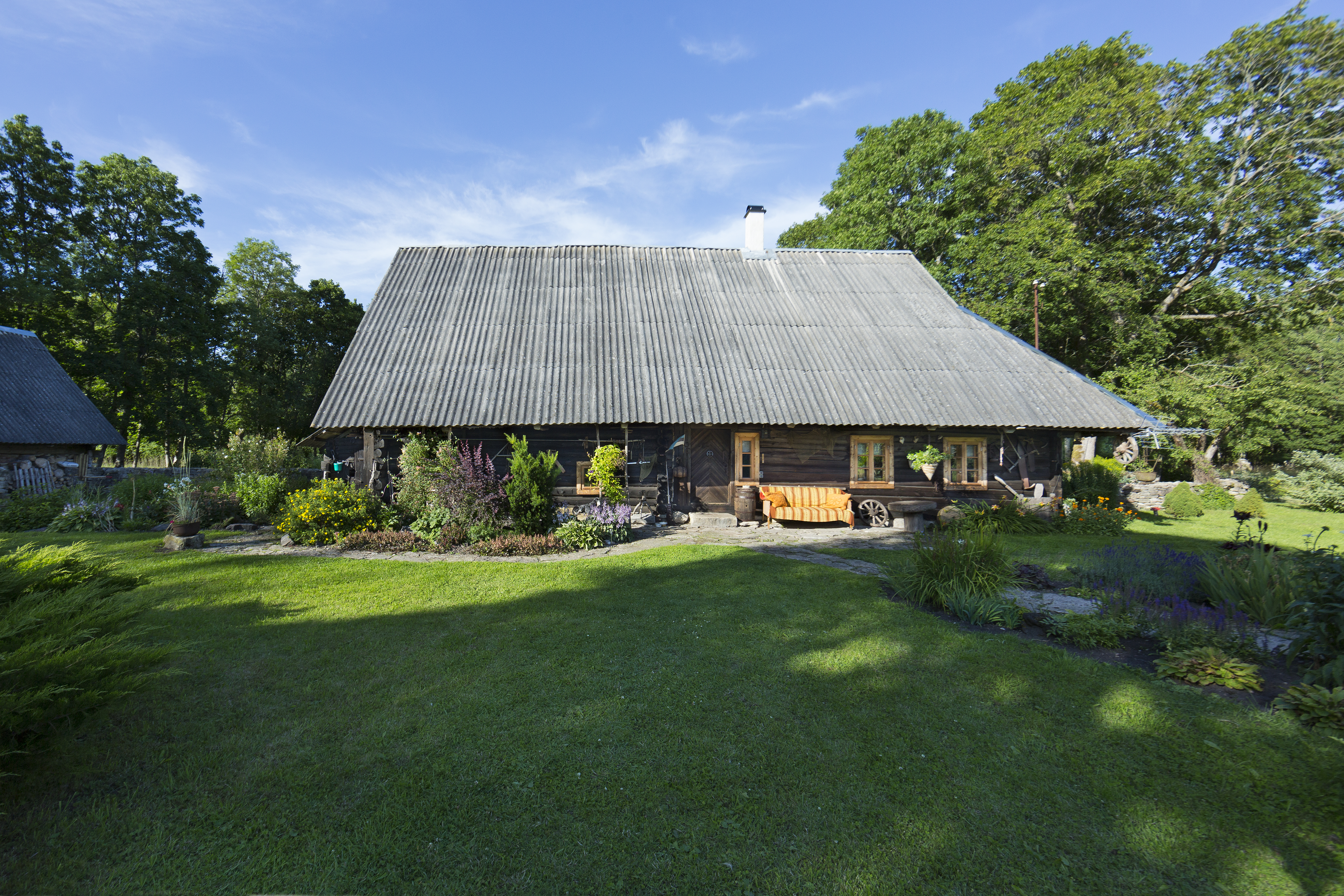 Mardi talu, Luulupe küla, Saaremaa